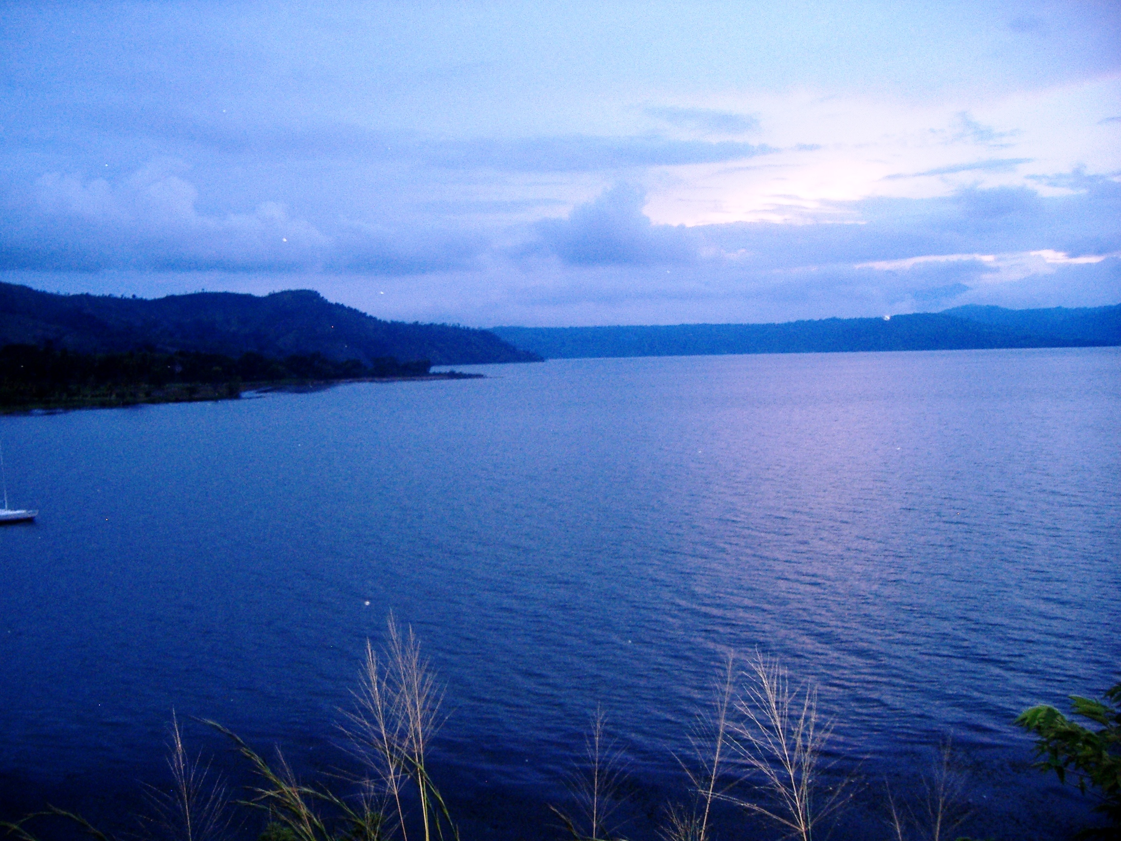 Fotografia del Bello Lago de Ilopango